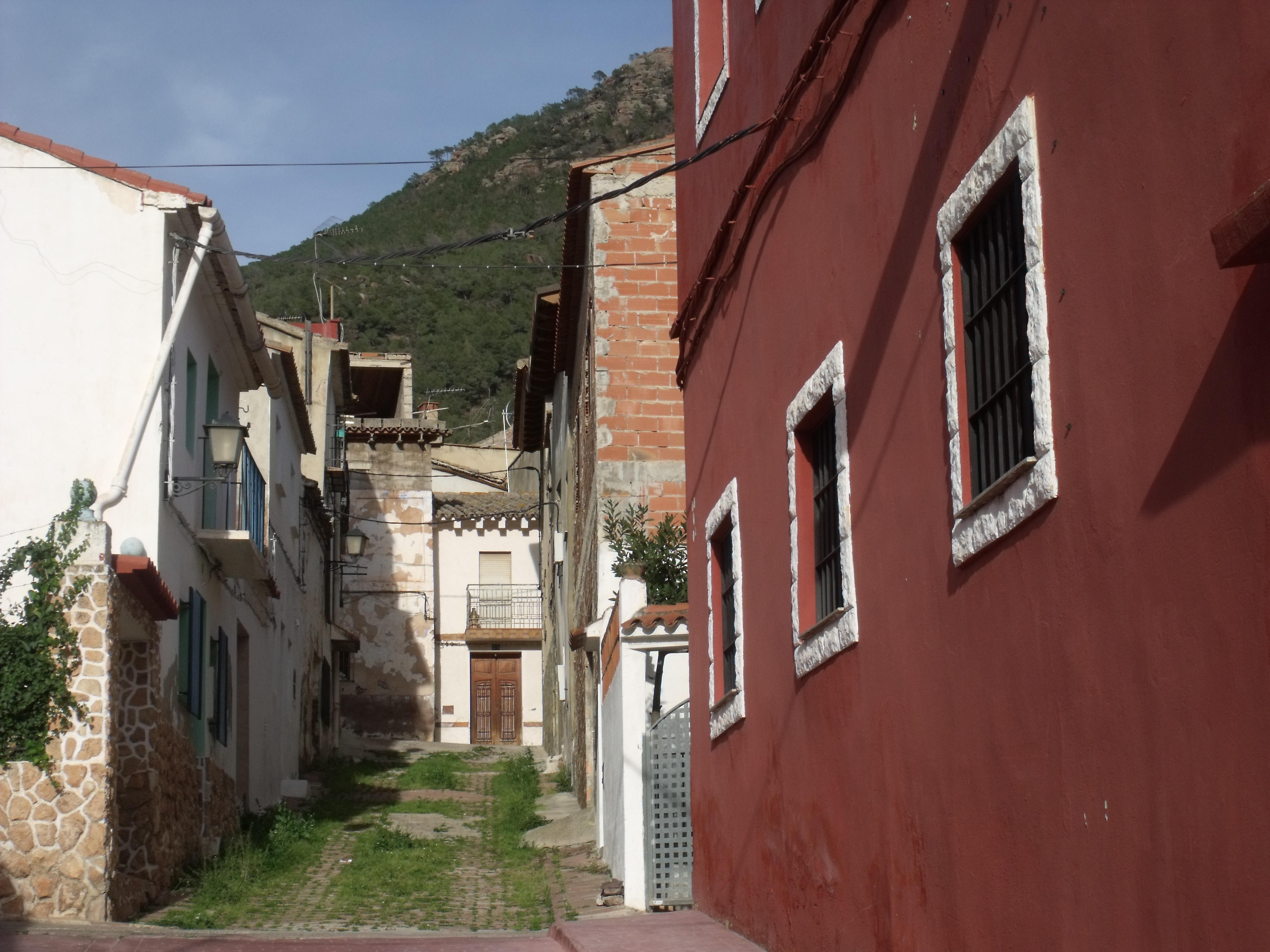 casas del pueblo